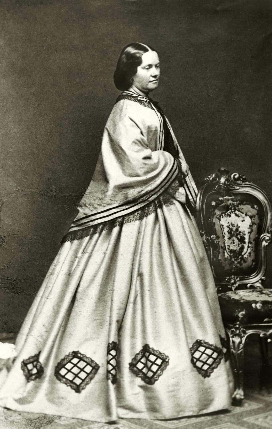 Depicted person: Sophie Adlersparre, Grevinna, Skribent, Sverige (1823-1895); Esselde (Signatur som skribent); Leijonhufvud, Karin Sophie (Fullständigt namn som ogift)